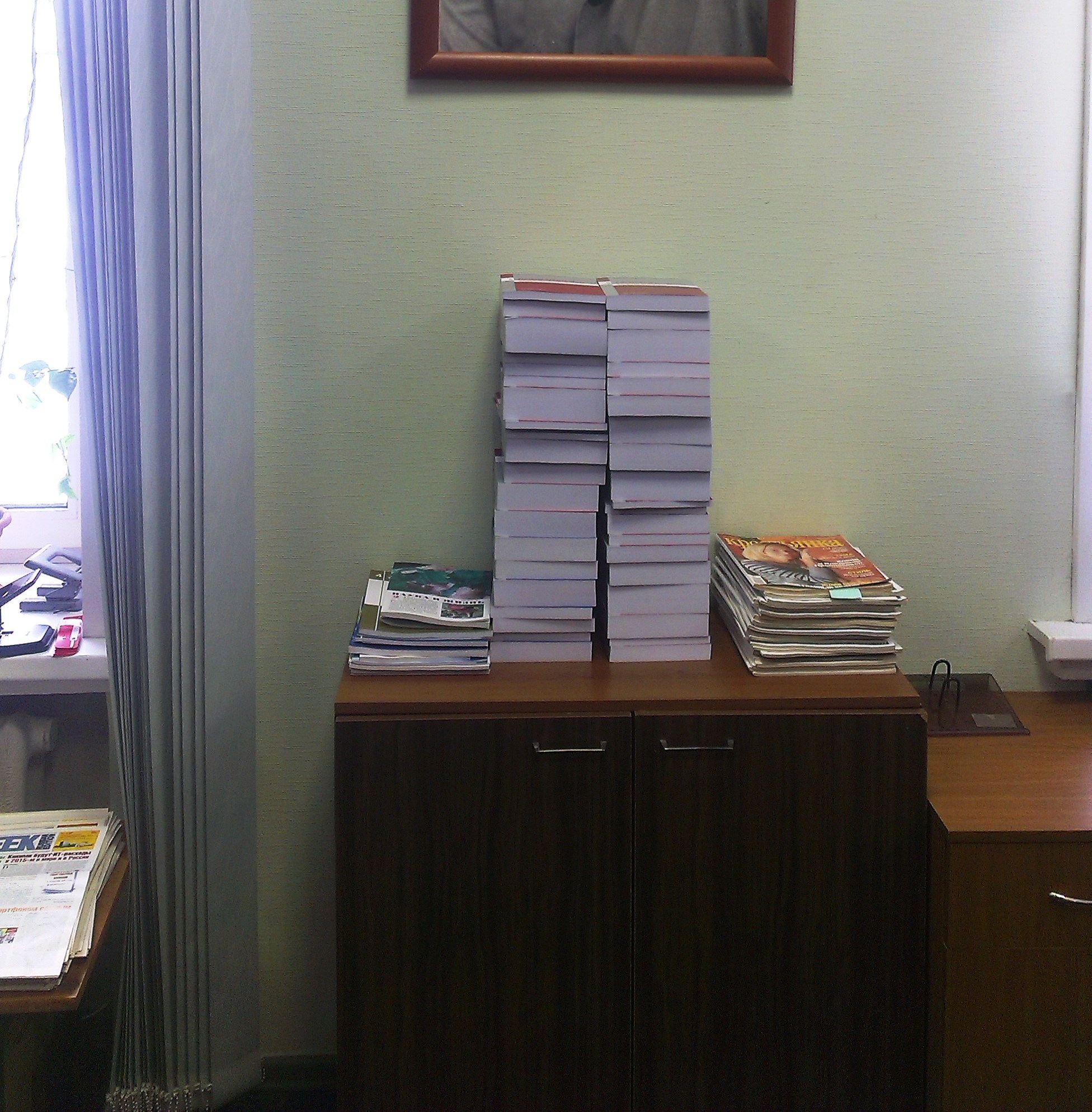 Кабинет А. Ершова